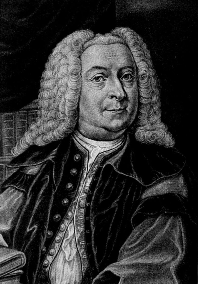 Georg Christian Gebauer (1690-1773)